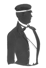 Silhouette (Schattenriß) von stud. theol. Otto Zöckler als Stifter des Gießener Wingolf